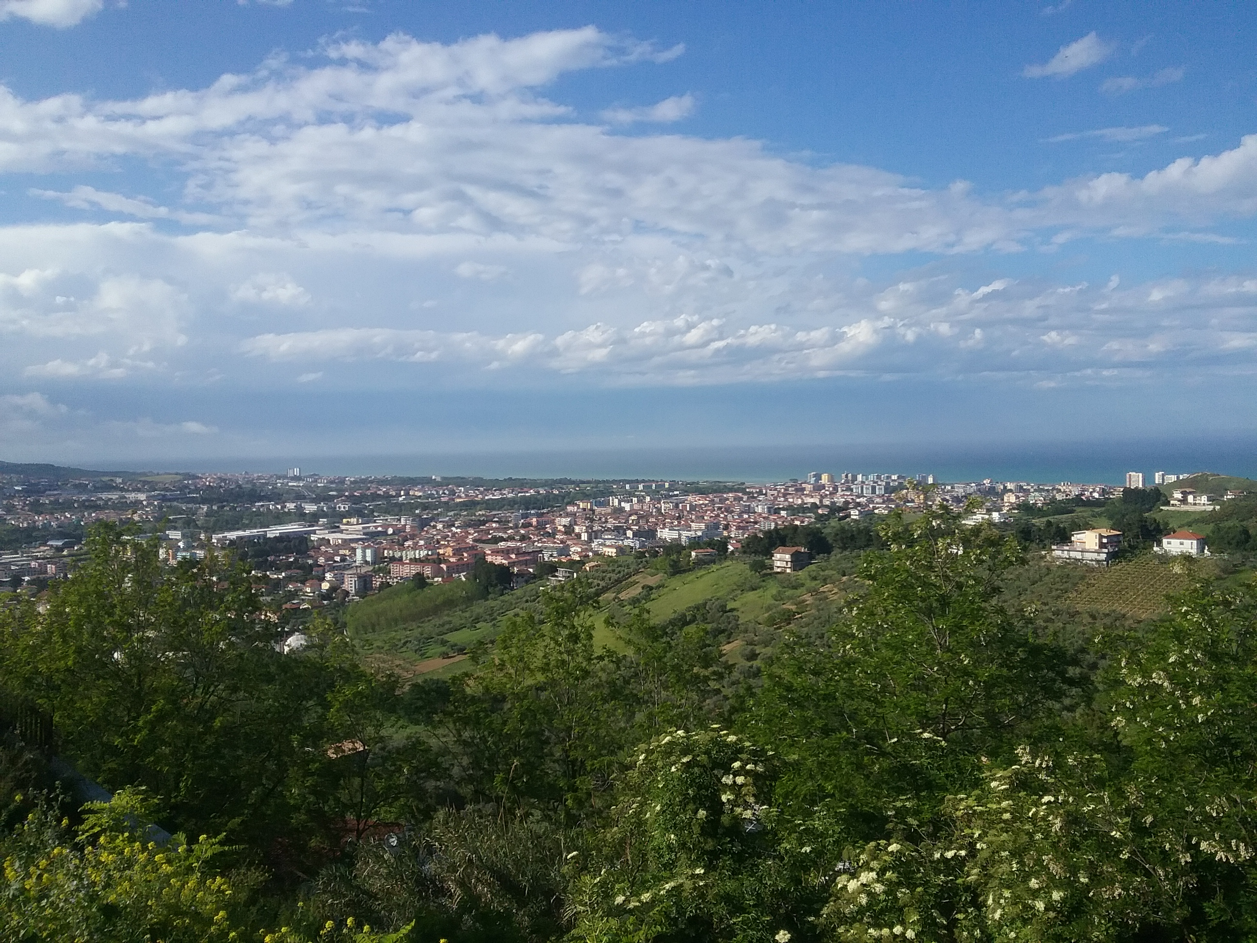 Vista di Montesilvano da Montesilvano Colle